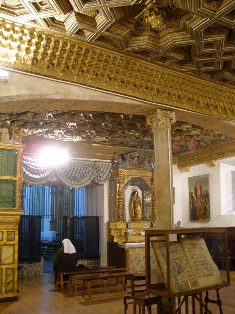 Salamanca - Convento de las Úrsulas